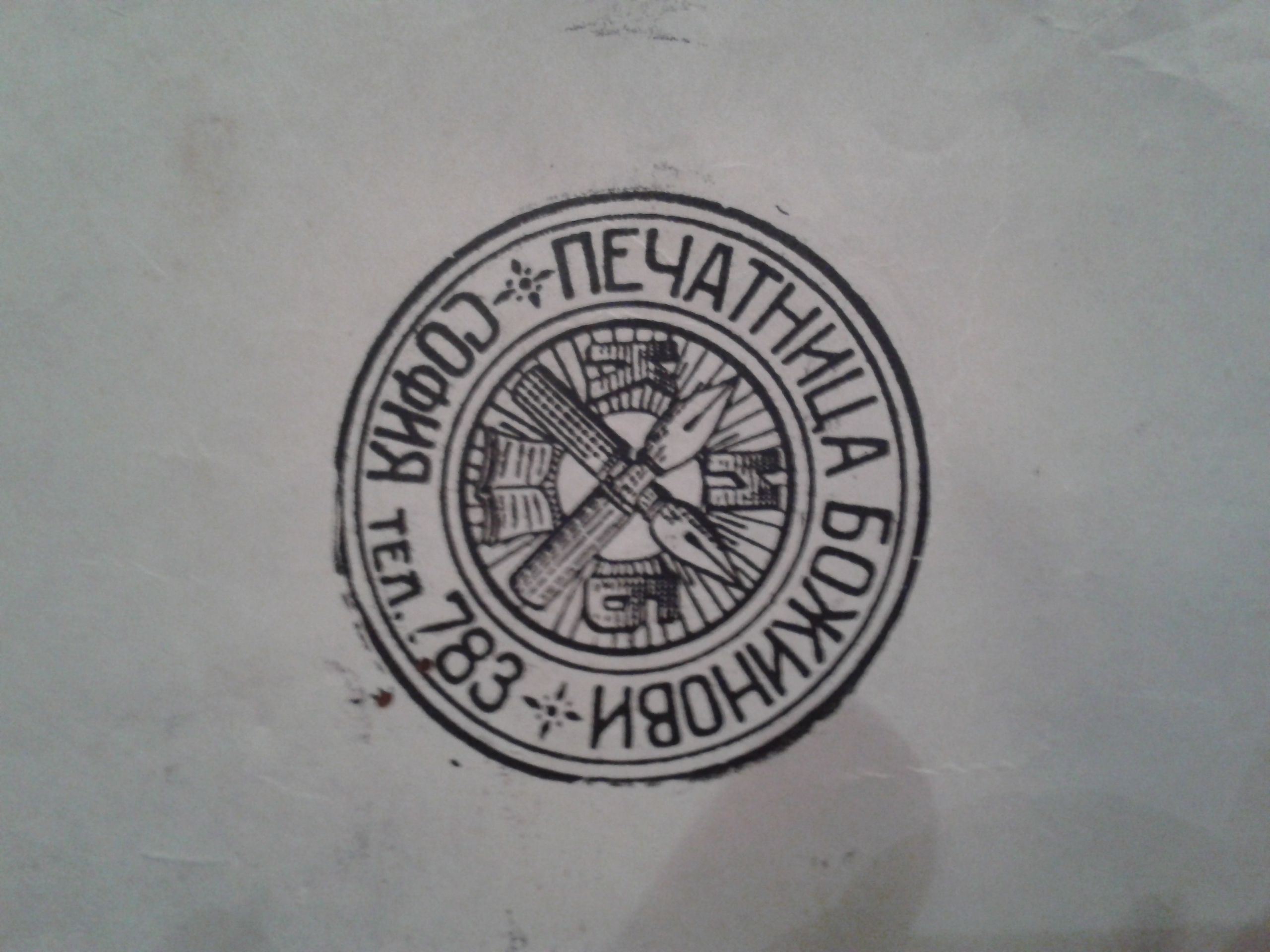 Печат на печатница "Божинови"